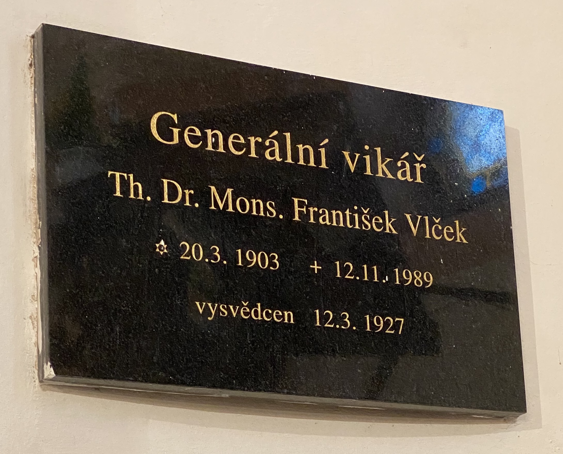 Mons. František Vlček, Krnsko - pamětní deska v kostele sv. Jiří